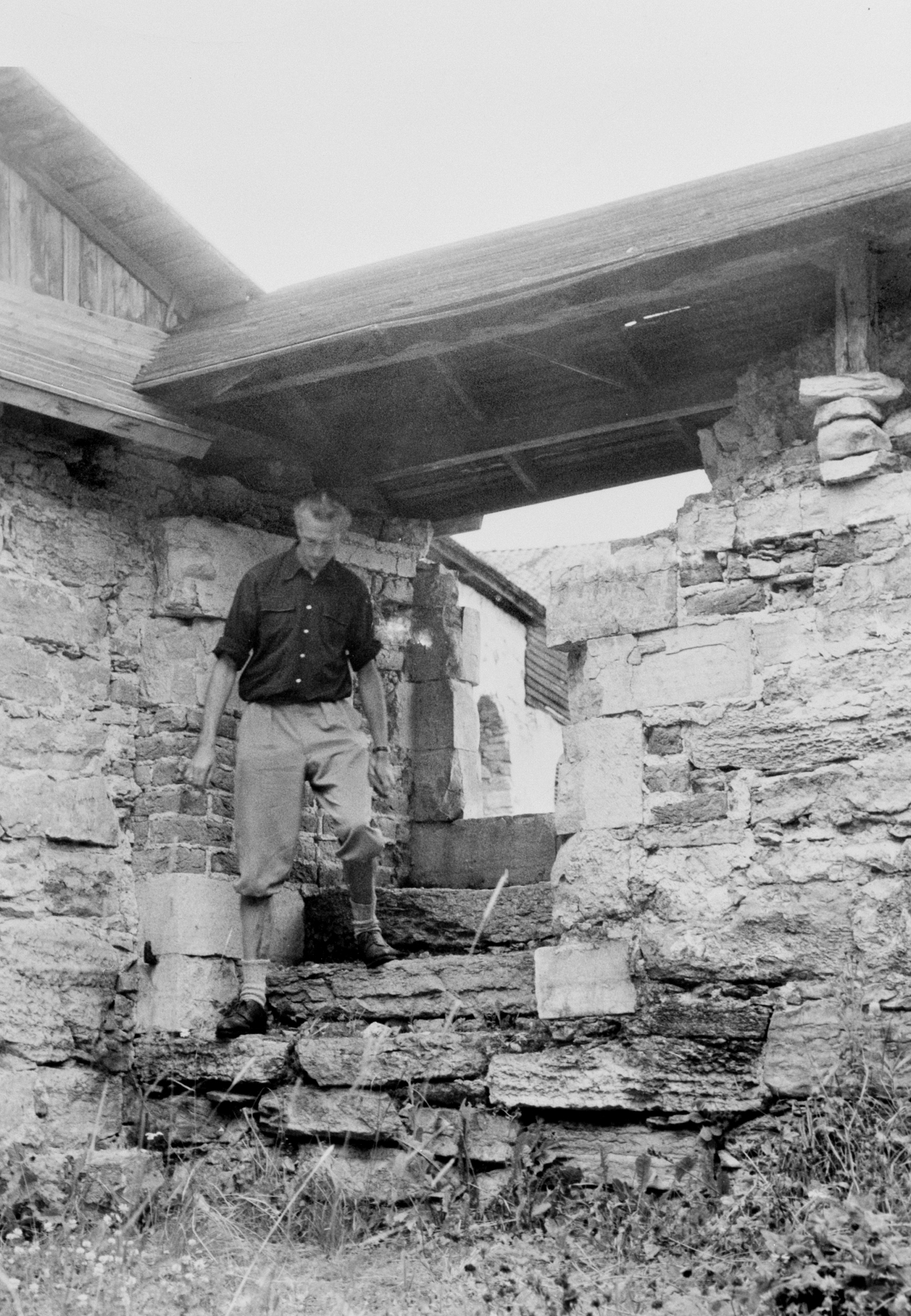 Håkon Christie under arkeologiske utgravninger på Domkirkeodden på Hamar i 1960. Foto: Aftenposten. Fra Domkirkeoddens fotoarkiv i Digitalt museum. Inventarnummer: 0401-07285.